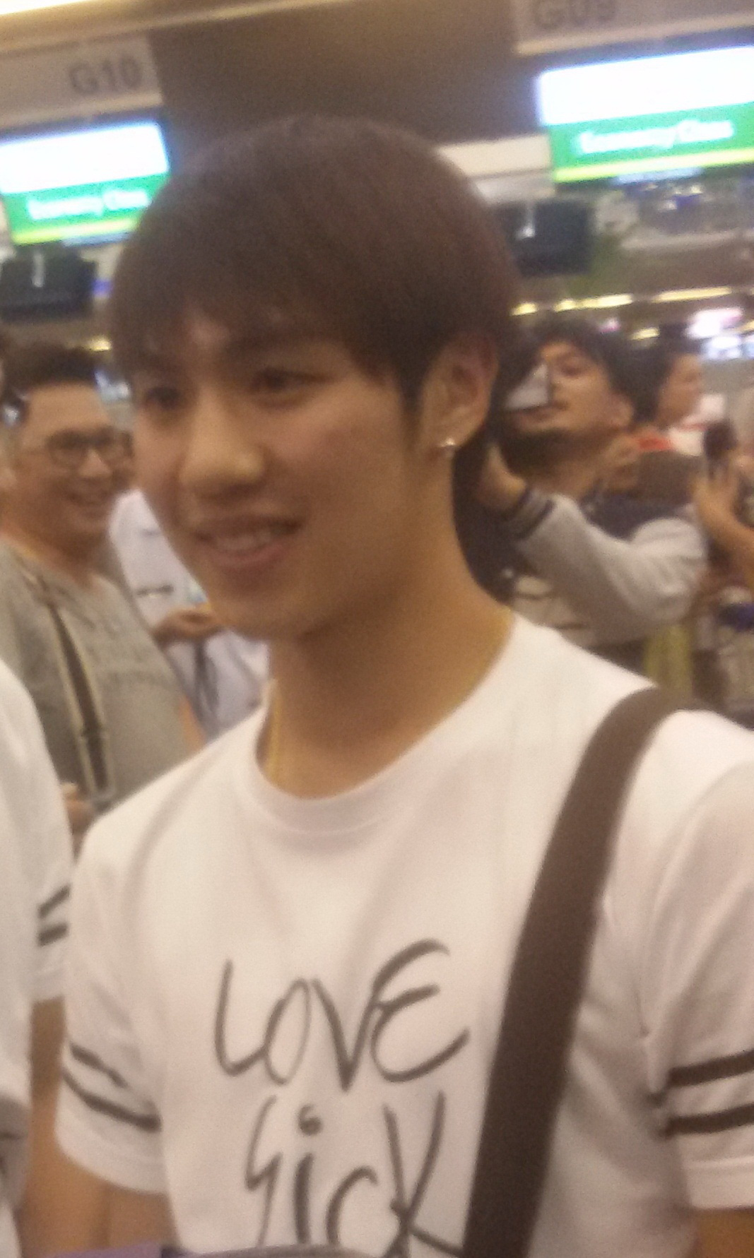 ณวัชร์ ที่สนามบินสุวรรณภูมิ